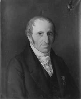 Ölgemälde in der Tübinger Professorengalerie